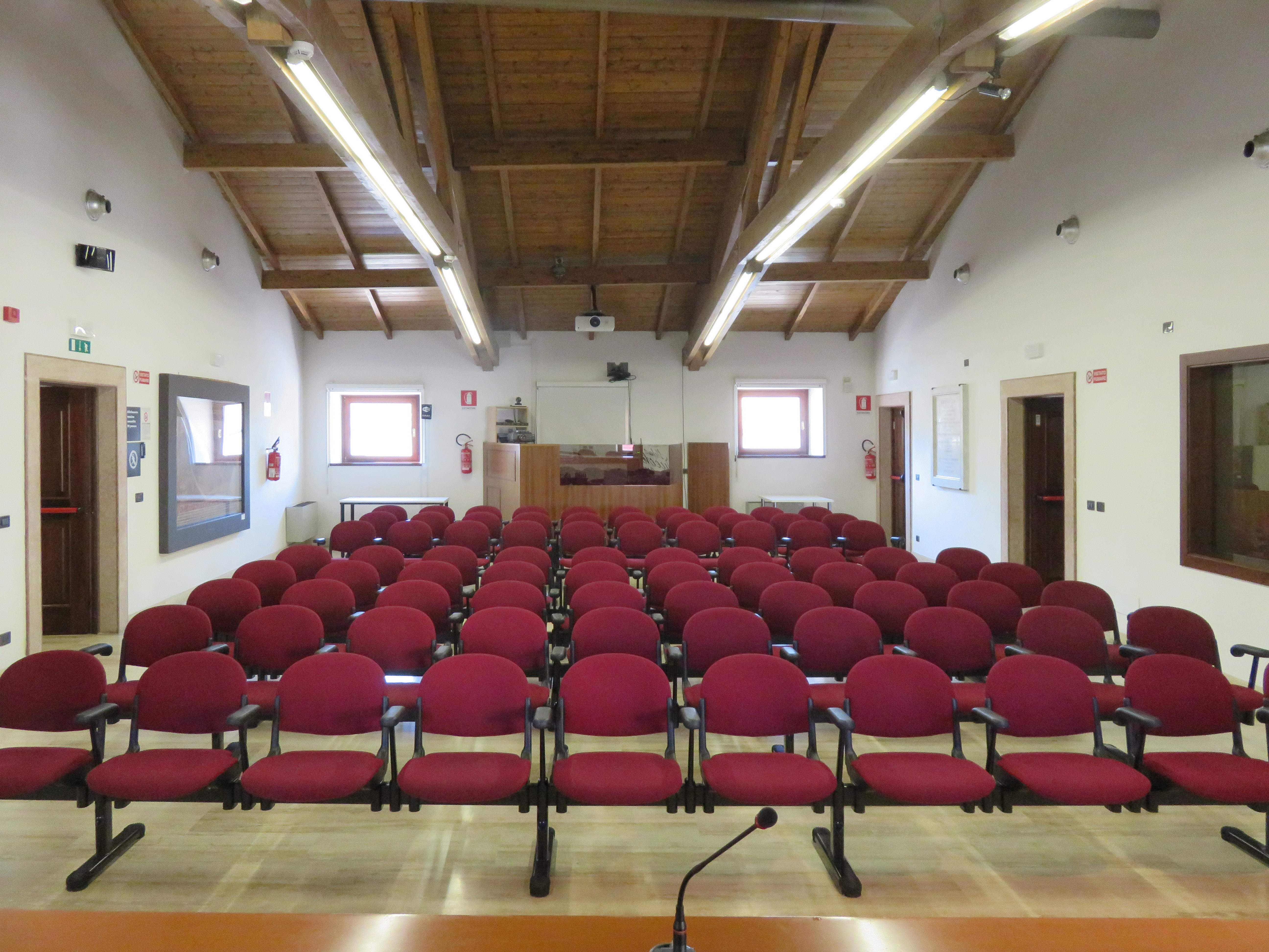 Sala Convegni della Fondazione museo civico di Rovereto, dedicata a Fortunato Zeni. La sala viene usata dalla Fondazione, per i suoi incontri, le conferenze, la collaborazione con le scuole e per altri scopi istituzionali.